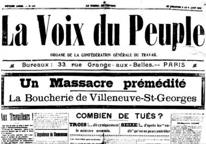 Le ministre Clémenceau est traité d'assassin